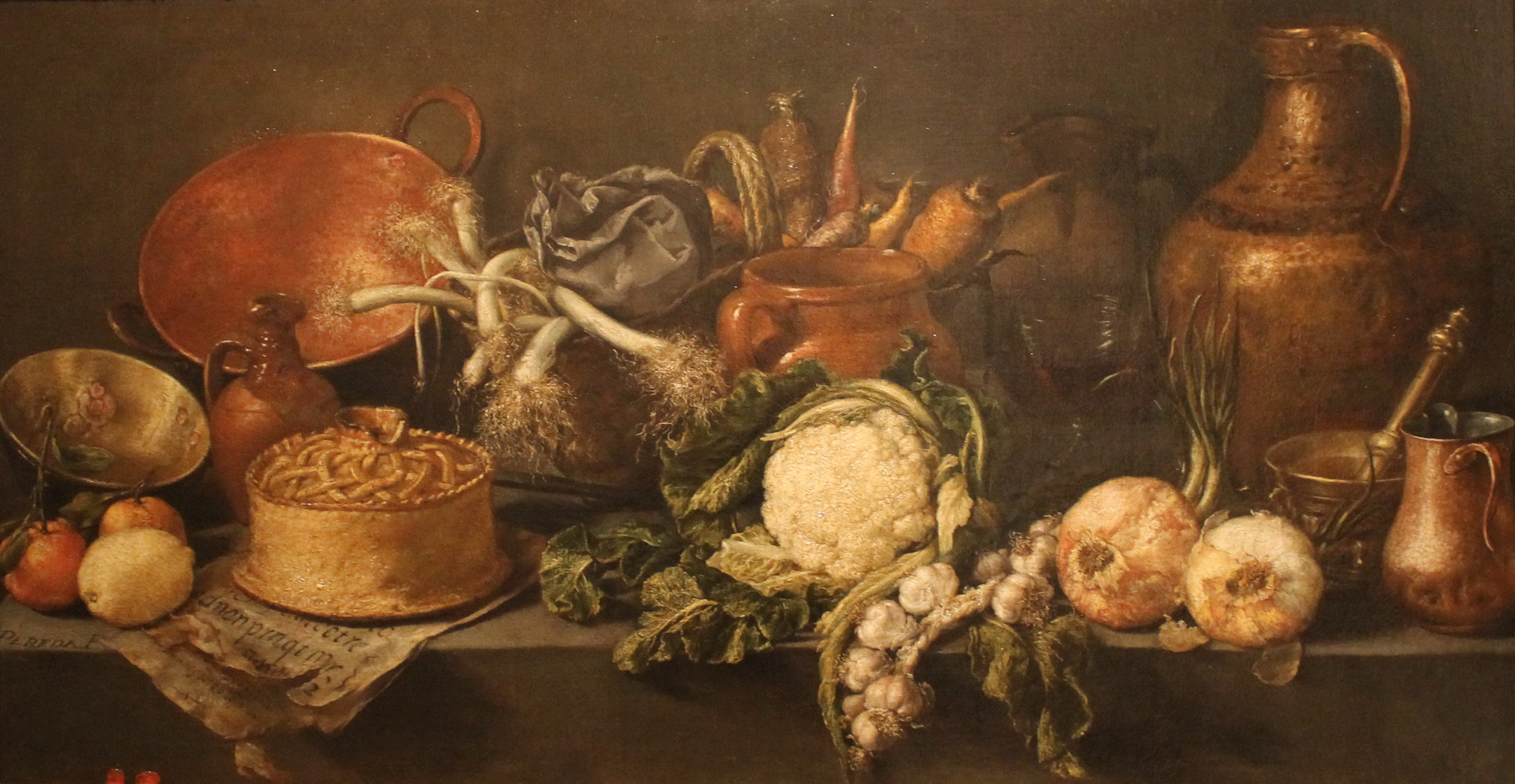 Naturaleza muerta con vegetales y enseres de cocina (1651), de Antonio de Pereda y Salgado (1608-1678). Museo Arte Antiga de Lisboa.